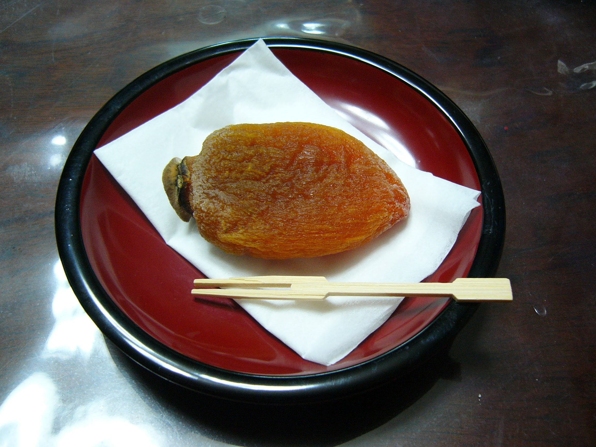 Dried Kaki Fruit（干し柿）